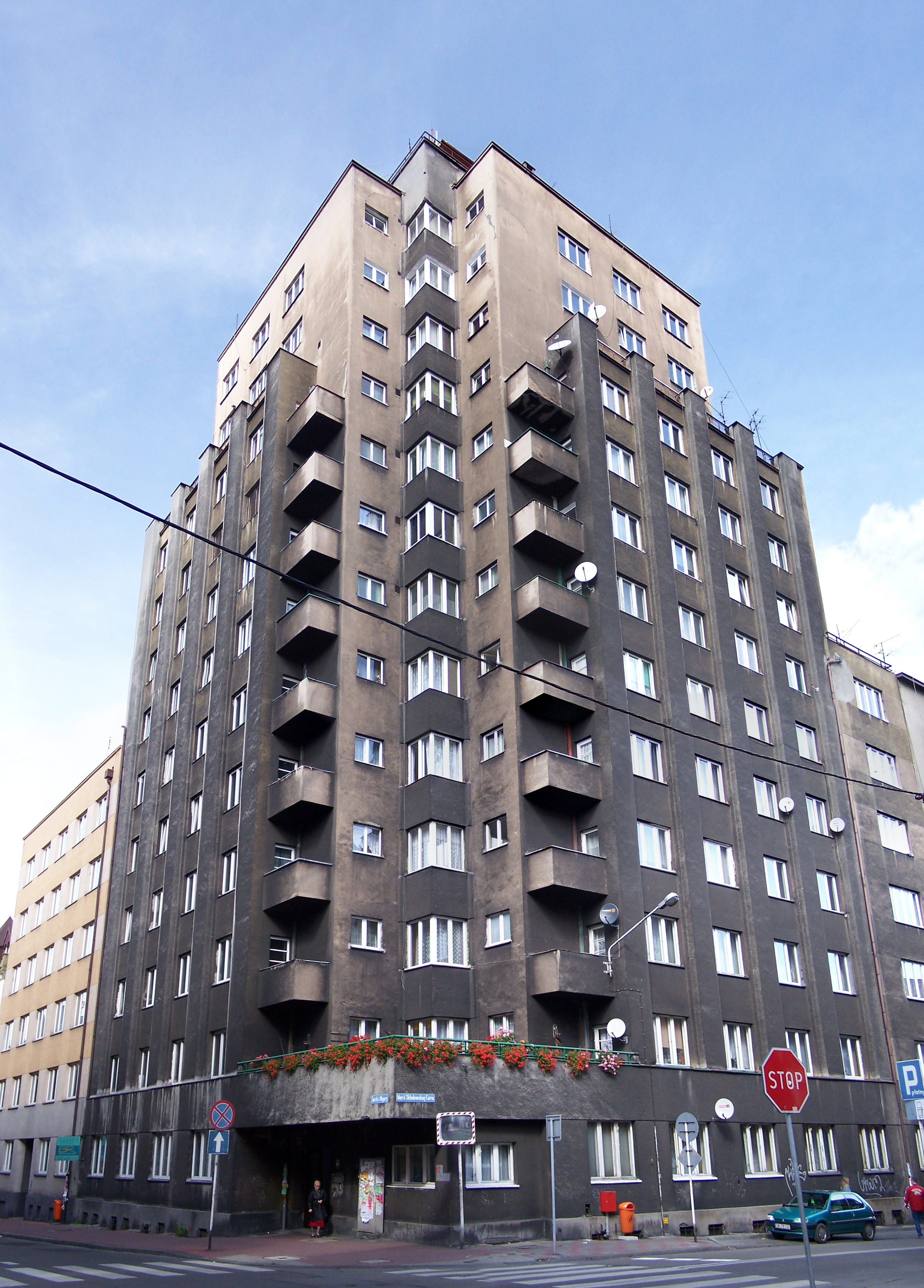 Hochhaus in Kattowitz.